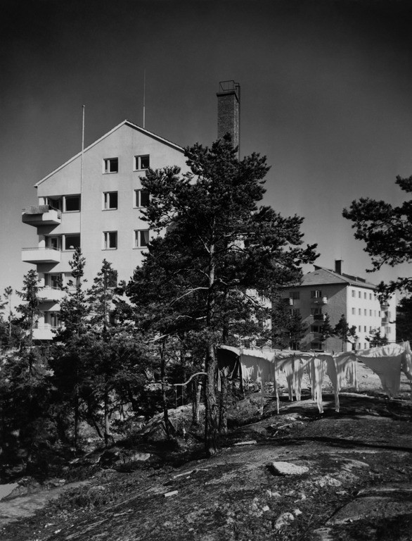 Länsi-Herttoniemi, Mäyrätie 7,9. Pyykit kuivuvat ulkona narulla.